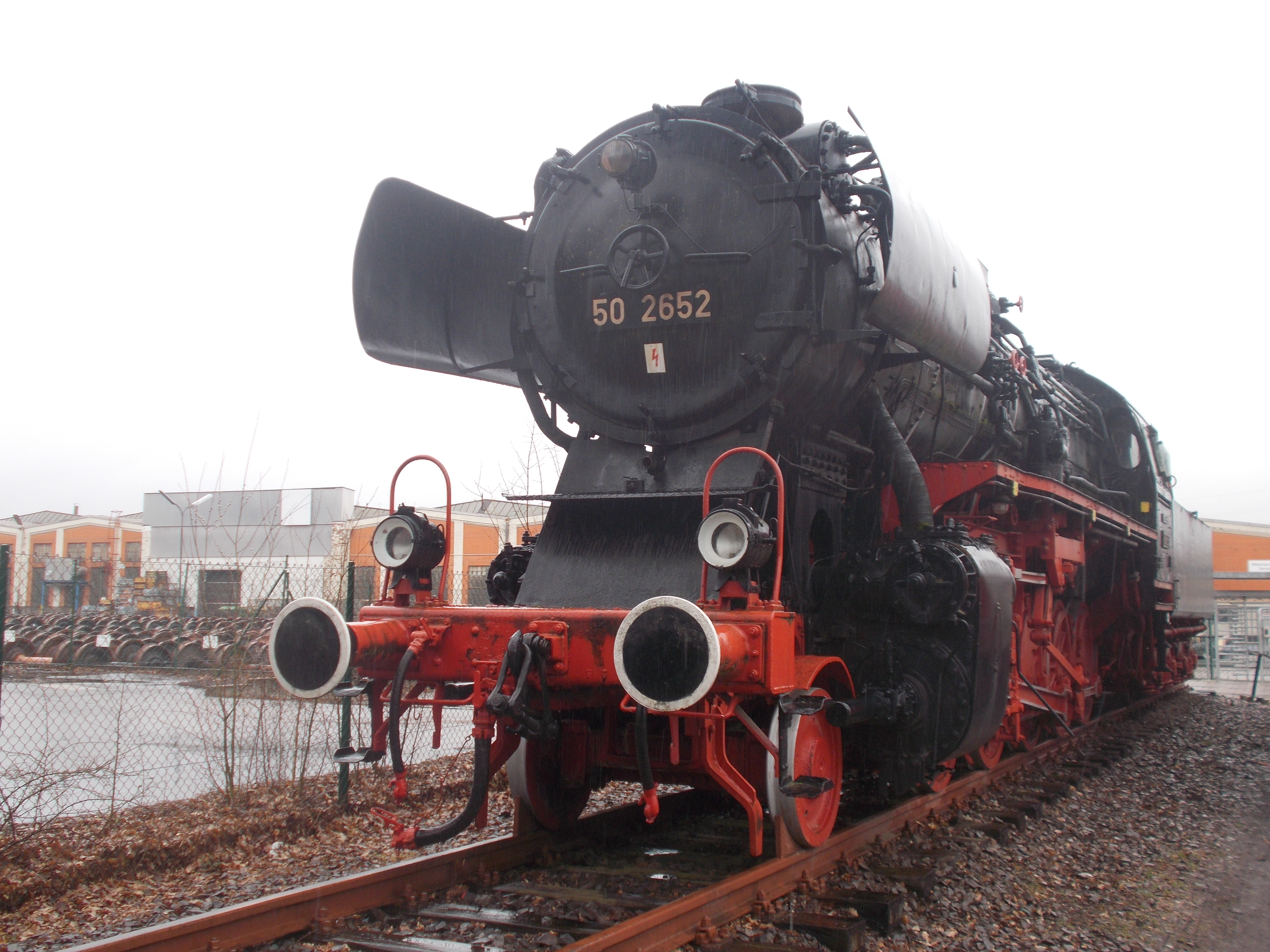 Dampflok der BR 052 vor dem denkmalgeschützten Eisenbahnausbesserungswerk Kaiserslautern